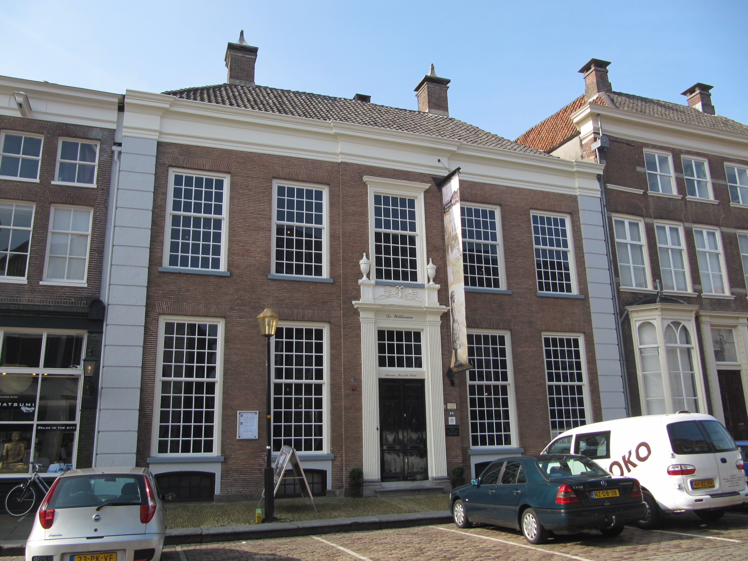 RM41328 Zutphen - Zaadmarkt 88.jpg